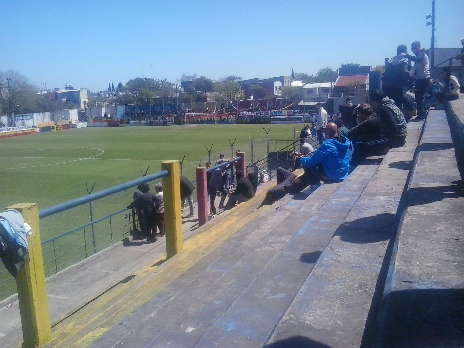 estadio de colegiales de argentina